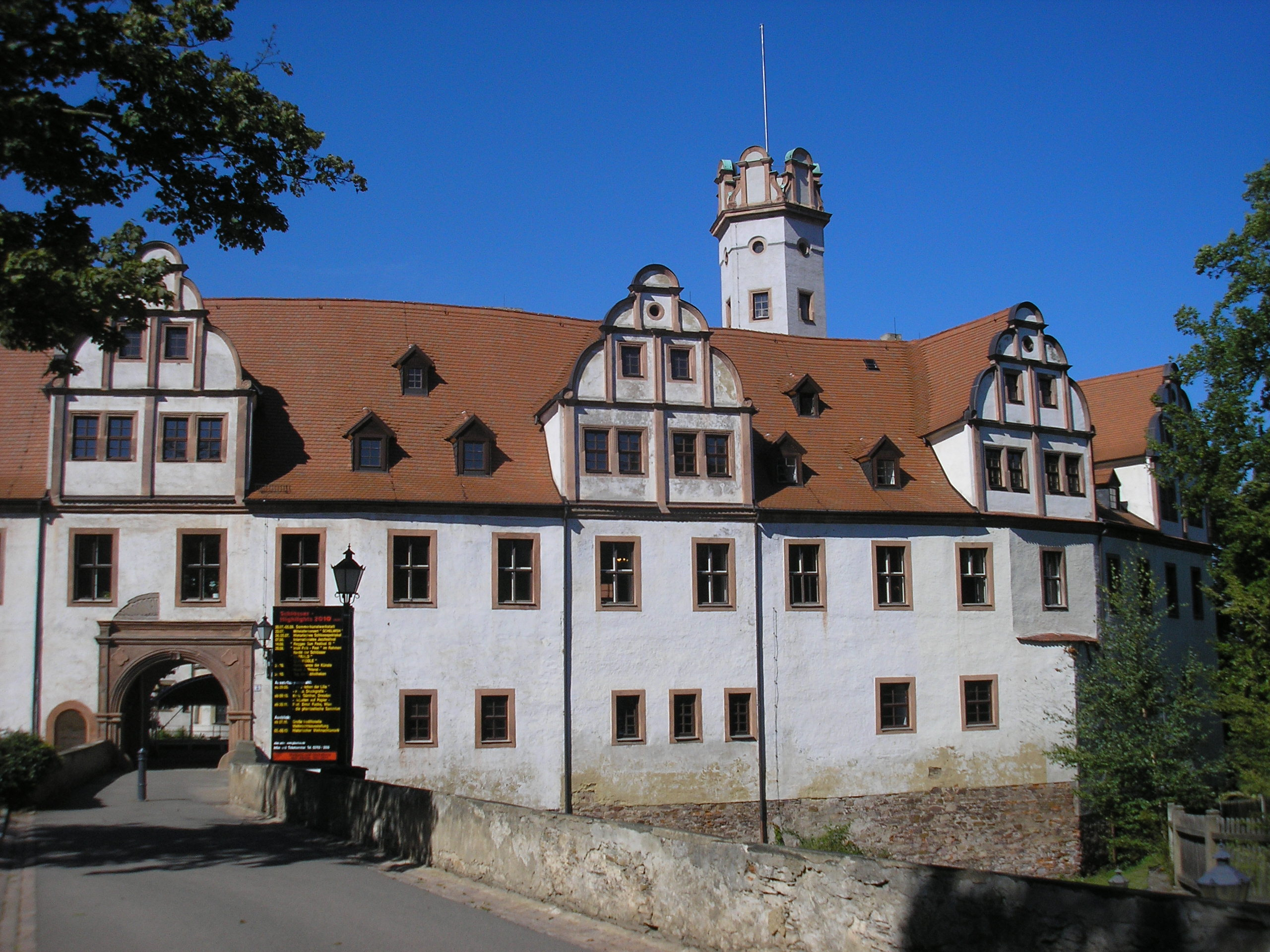 Die Stadtseite des Schlosses Forderglauchau in Glauchau (Sachsen).